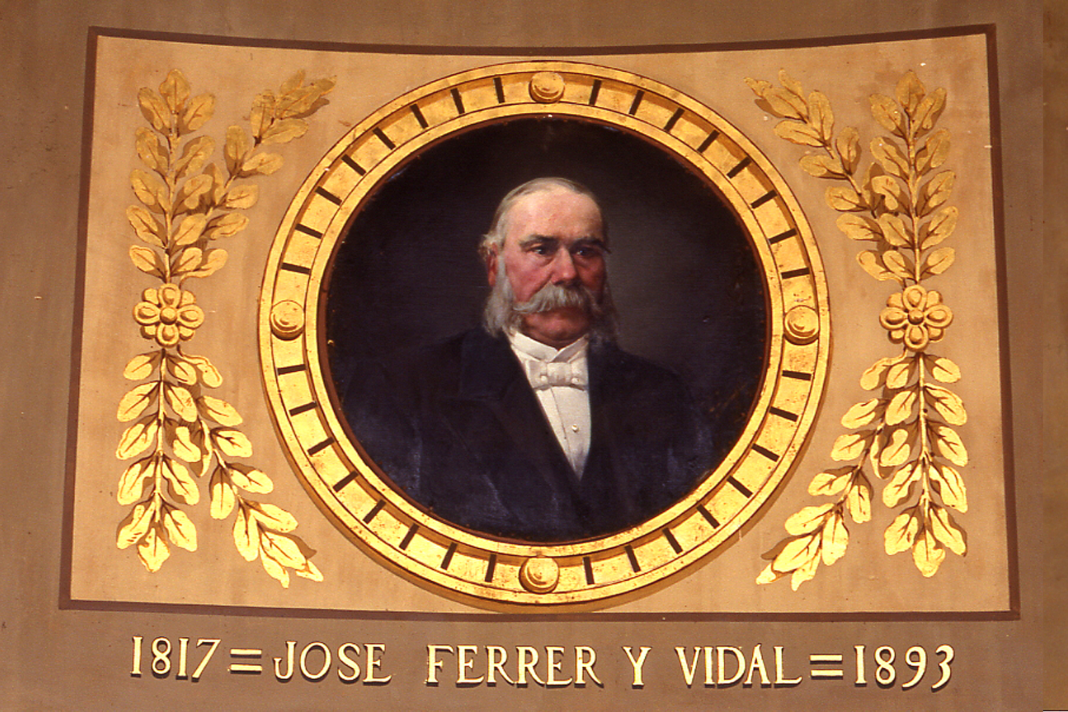 Retrat de bust d'un home d'edat avançada, amb els cabells grisos, grans patilles i bigoti, amb camisa blanca de coll alt i jaqueta fosca. La tela amb forma de medalló està enganxada sobre el mur i envoltada per un marc i unes fulles de llorer pintades en daurat com la inscripció amb el nom de Jose Ferrer y Vidal i les dates de naixement i mort situades a sota. El retrat i les fulles estan inscrits en un rectangle.